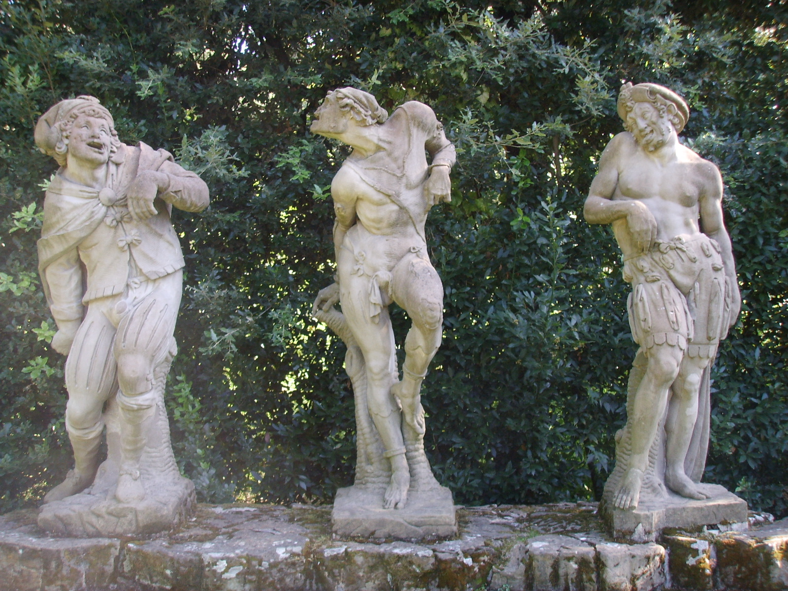 Boboli, tre figure grottesche di Romolo del Tadda